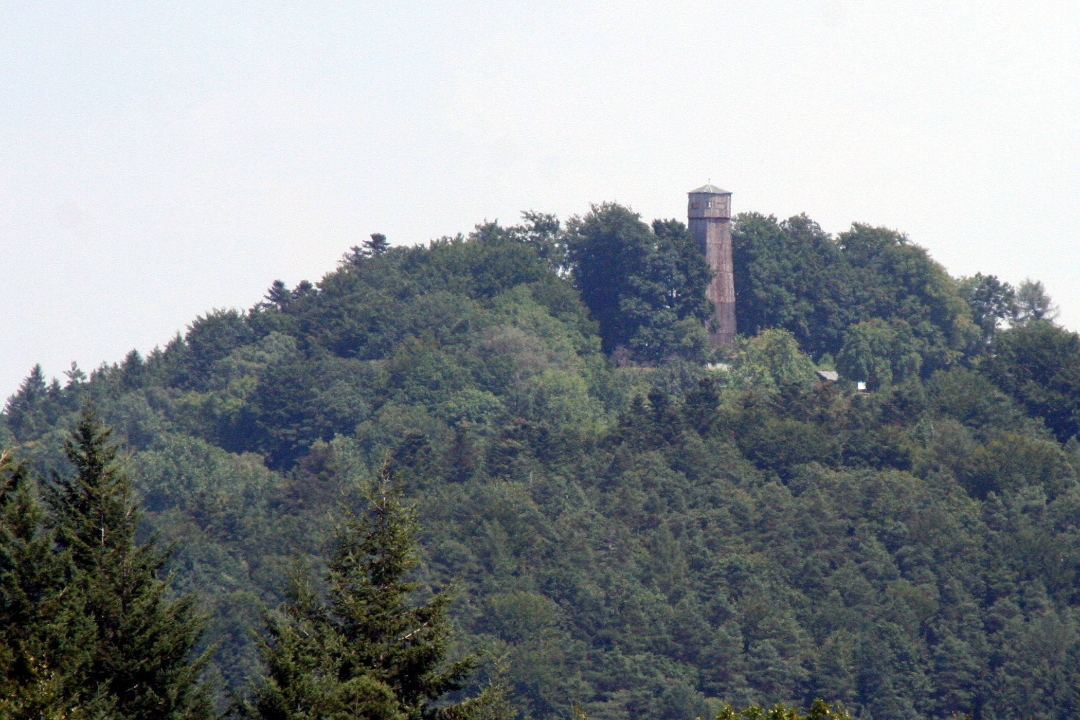 Der 525 m hohe Berg Steinknickle in Wüstenrot-Neuhütten, fotografiert von der B 39 bei Wüstenrot-Stollenhof